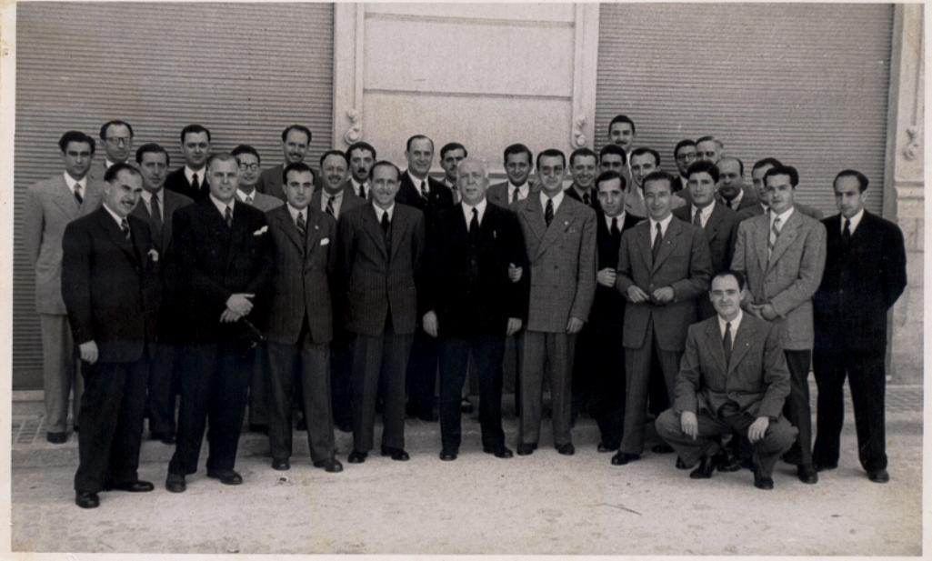 La Junta del Colegio de Abogados con el decano Sr Pérez Mirete al frente homenajean al alcalde de Alicante y colegidado.